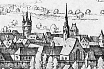 Franziskanerkloster St. Wolfgang in Kreuznach; Ausschnitt aus dem Stadtplan von 1645